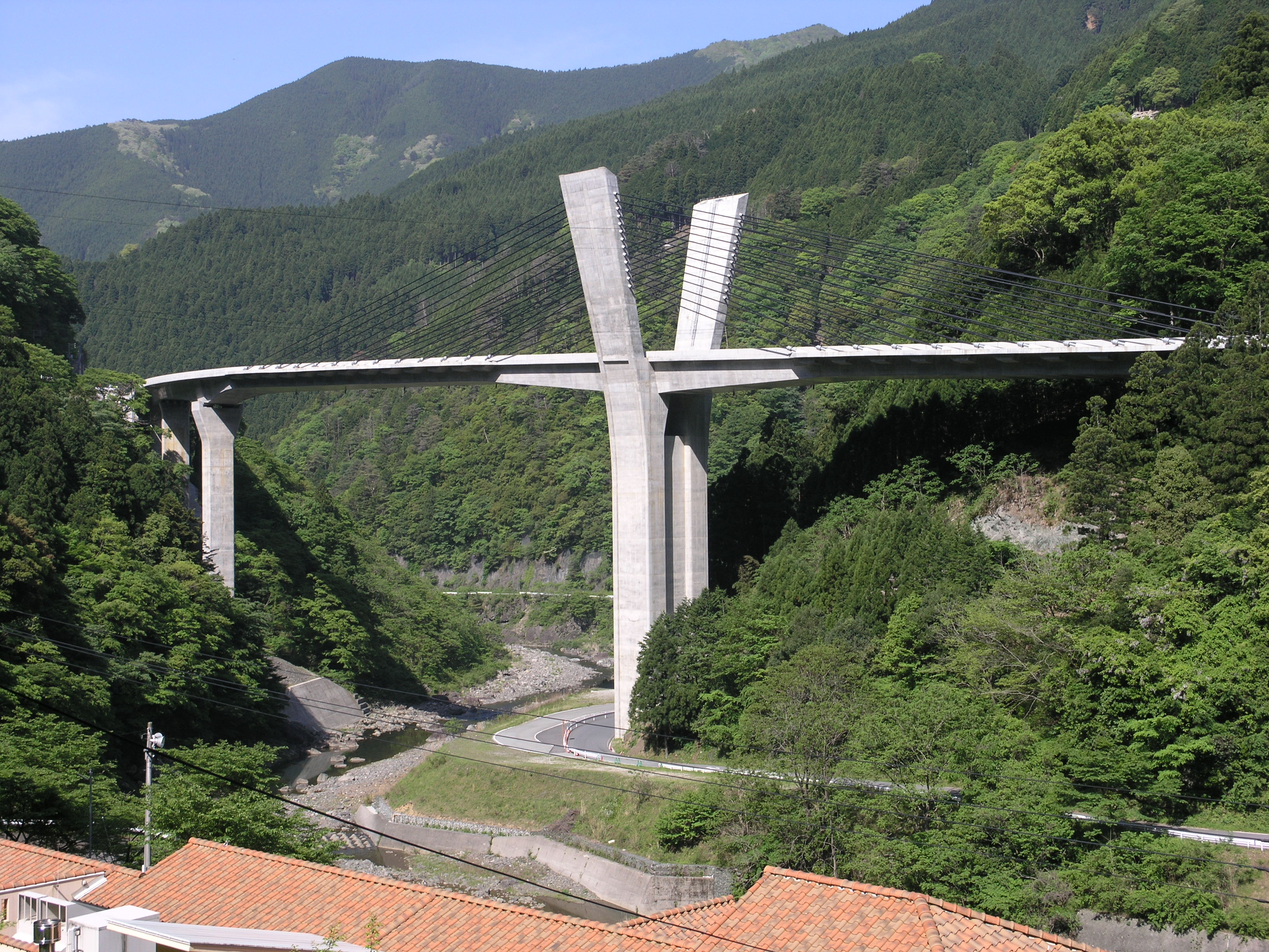 国道168号辻堂バイパス・夢翔大橋 (奈良県五條市大塔町)